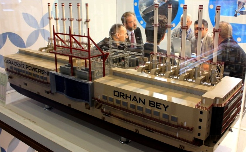 Modell des Kraftwerkschiffes Orhan Bey